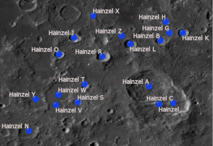 Cráter lunar Hainzel. Cráteres satélite. (Imagen LRO)